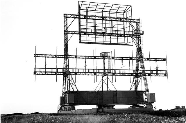 FuSAn 724/725 "Bernhard", Stützpunkt Tanne-Y Aufgenommen bei Hundborg / Dänemark